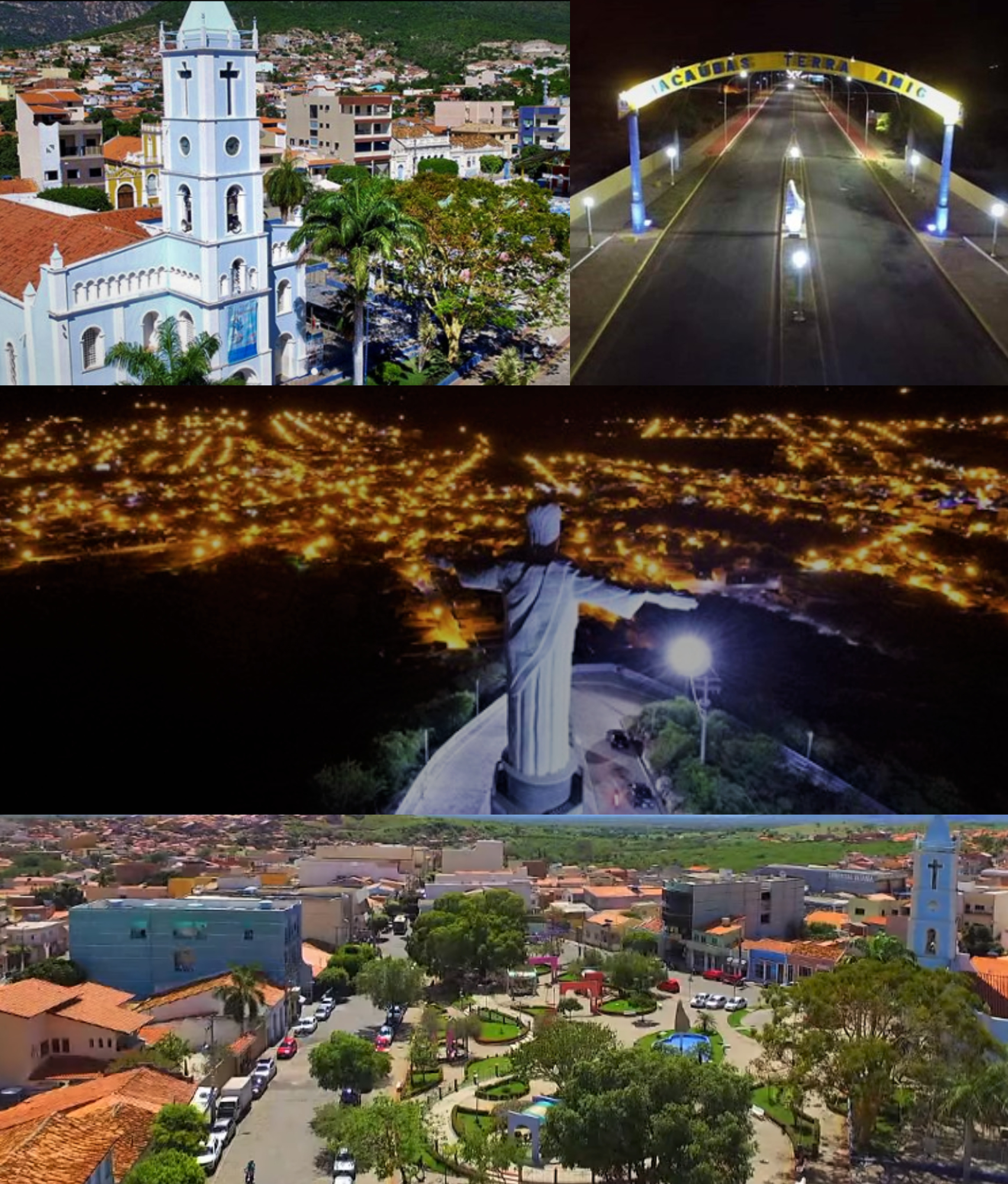 Compilação de Imagens dos cartões postais da cidade de Macaúbas-BA